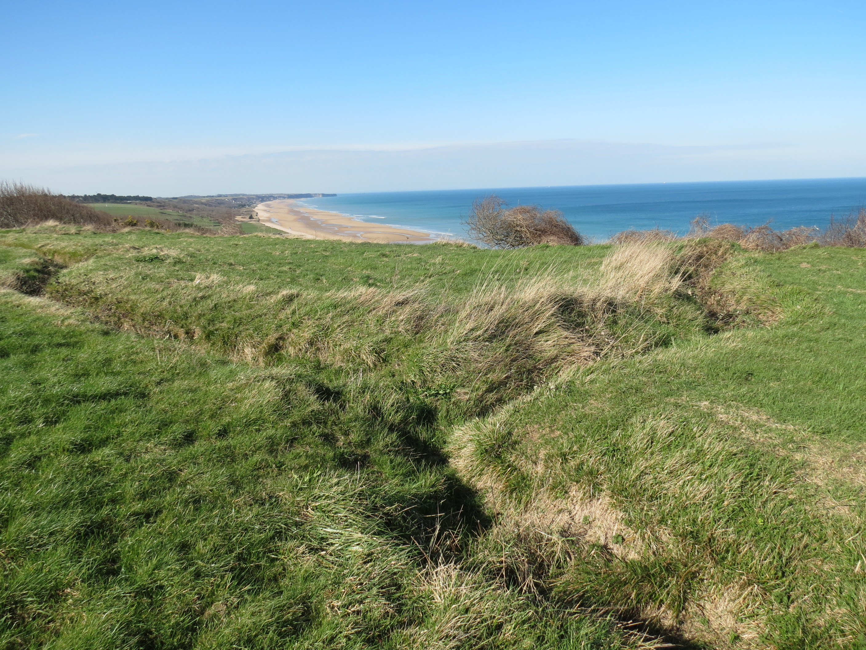 Omaha Beach - WN 60